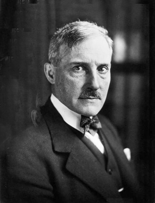 M. Labeyrie, secrétaire général du ministère des Finances (portrait) : [photographie de presse]